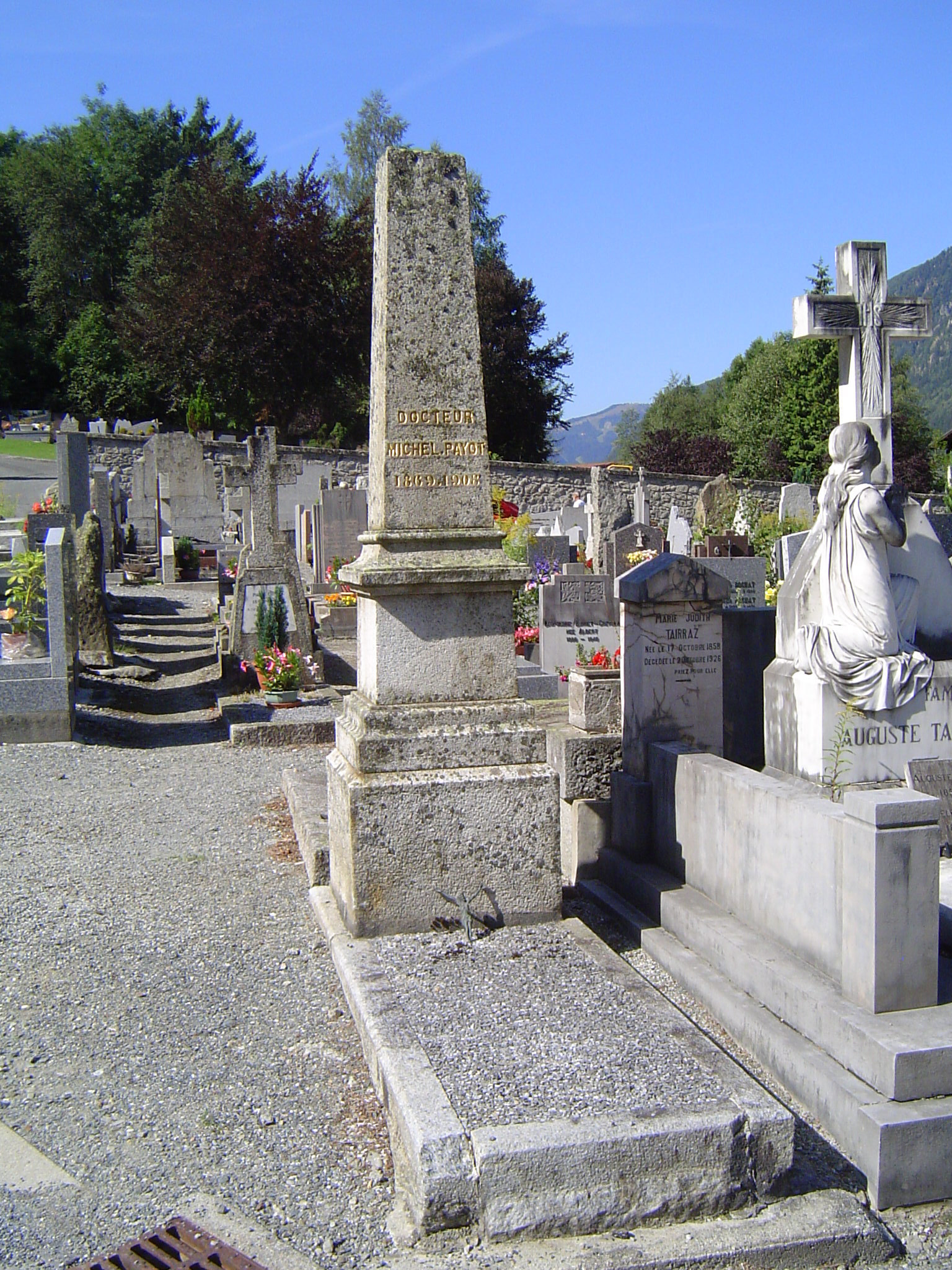 Photo prise au cimetière de Chamonix-Mont-Blanc (France)